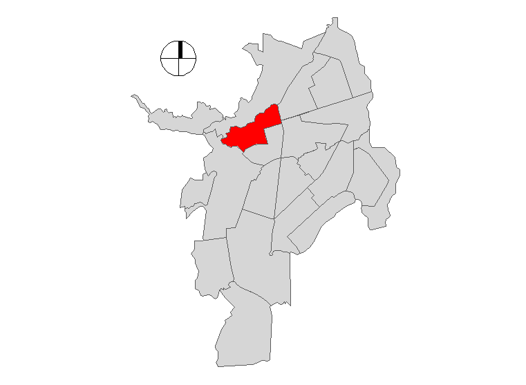 Comuna 3 de Santiago de Cali, Colombia.